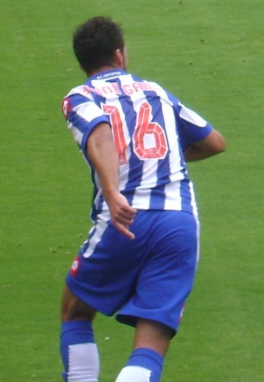 Bruno Gama, futbolista portugués.